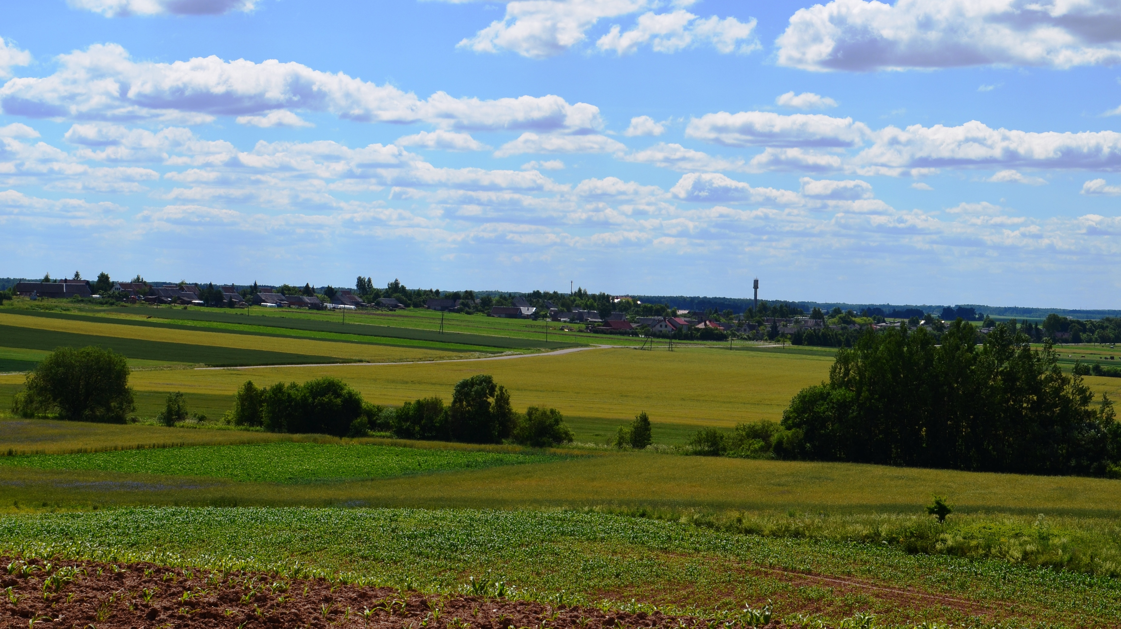 Liučiūnai, Kauno raj.